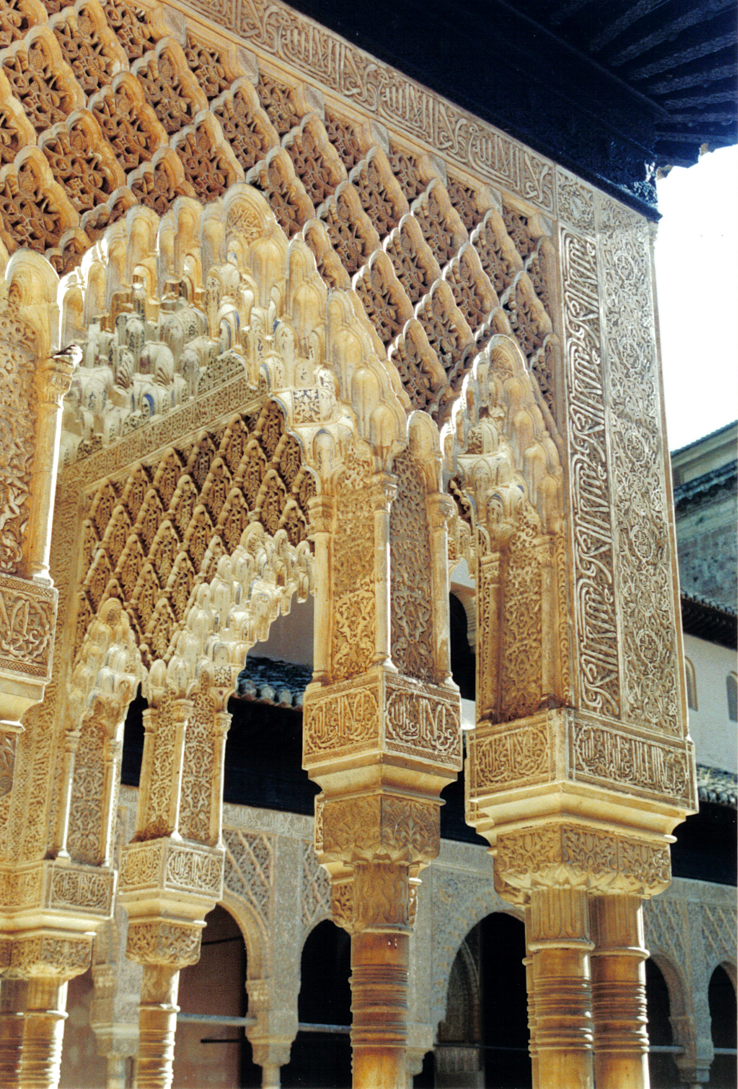 Alhambra de Grenade - Cour des Lions - décors de sebka